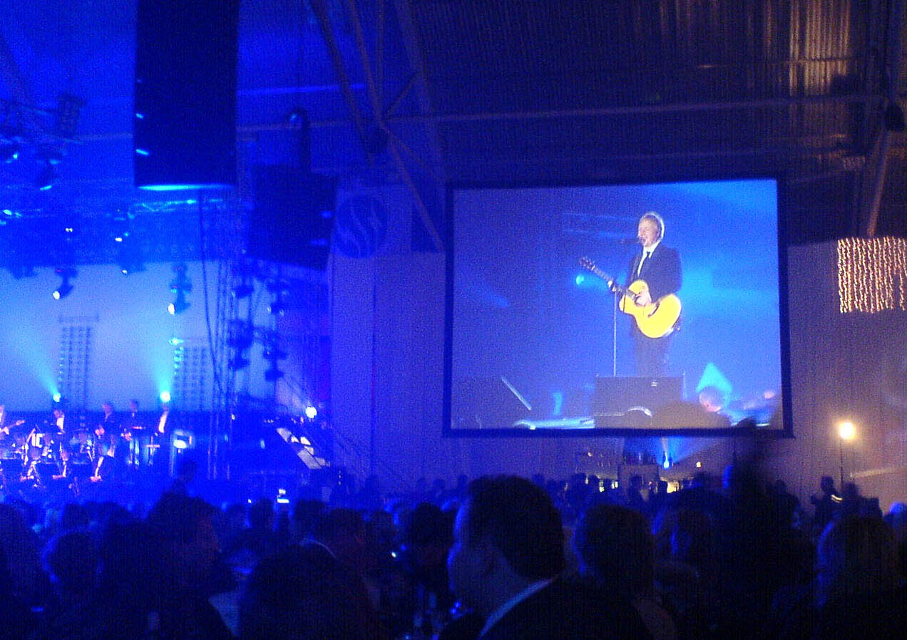 Kurt Nilsen, Valhall, Oslo, Norway.